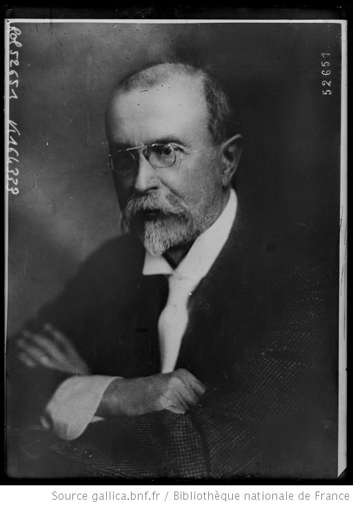 Thomas Msaryk, presidente de Checoslovaquia, en 1919.